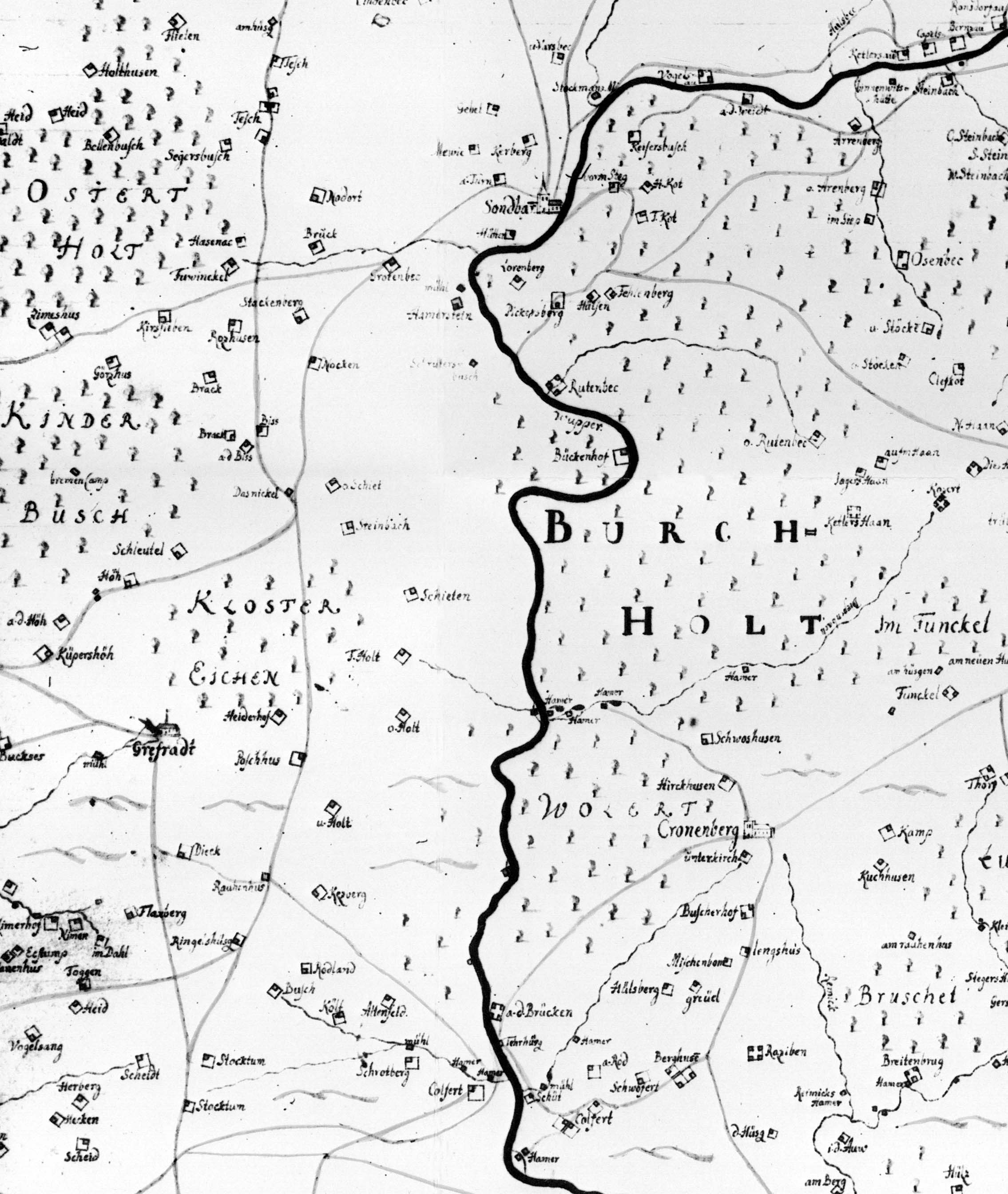 Karte (Topographia Ducatus Montani) des Burgholz von Erich Philipp Ploennies (1715)